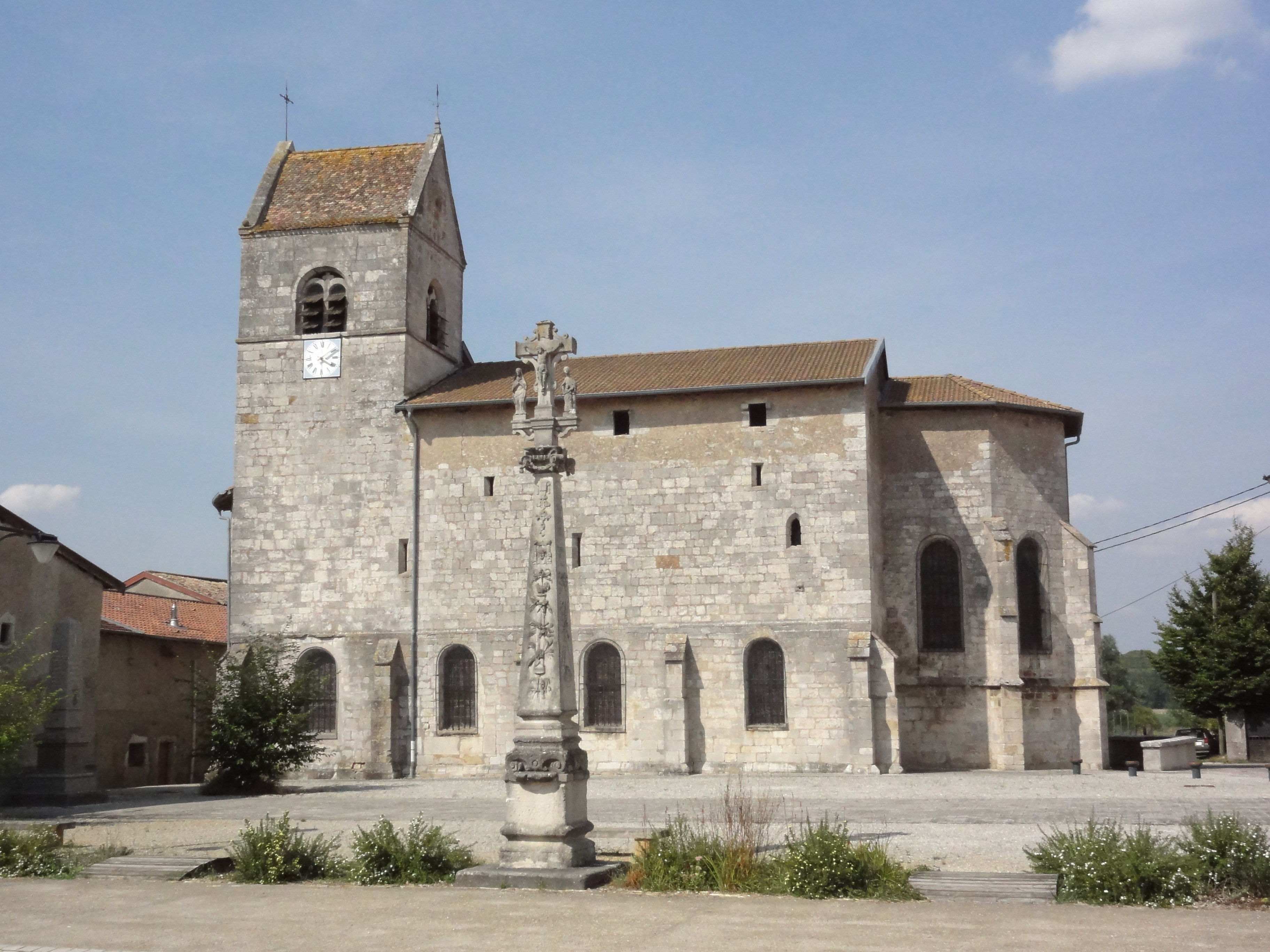 Troussey (Meuse) église et croix du parvis